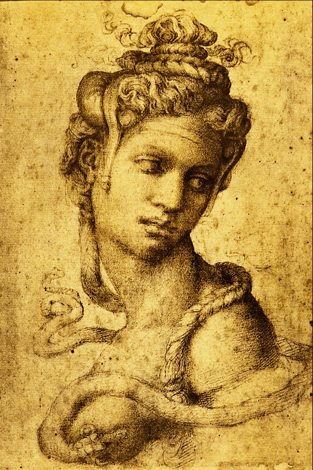 Cleopatra